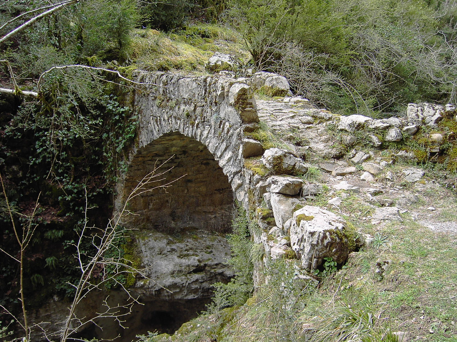 Antiguo puente sobre el Barranco de Aso, en el Valle de Fanlo. Muy cerca de la entrada al Cañón de Añisclo por Sercué.